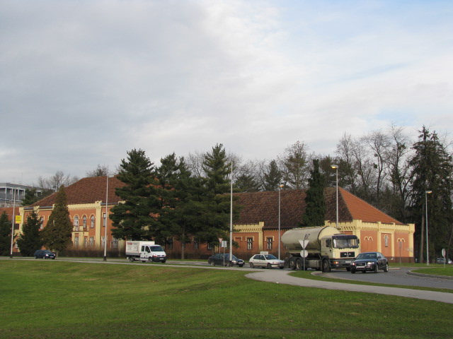 Feštetićeva zgrada u Čakovcu